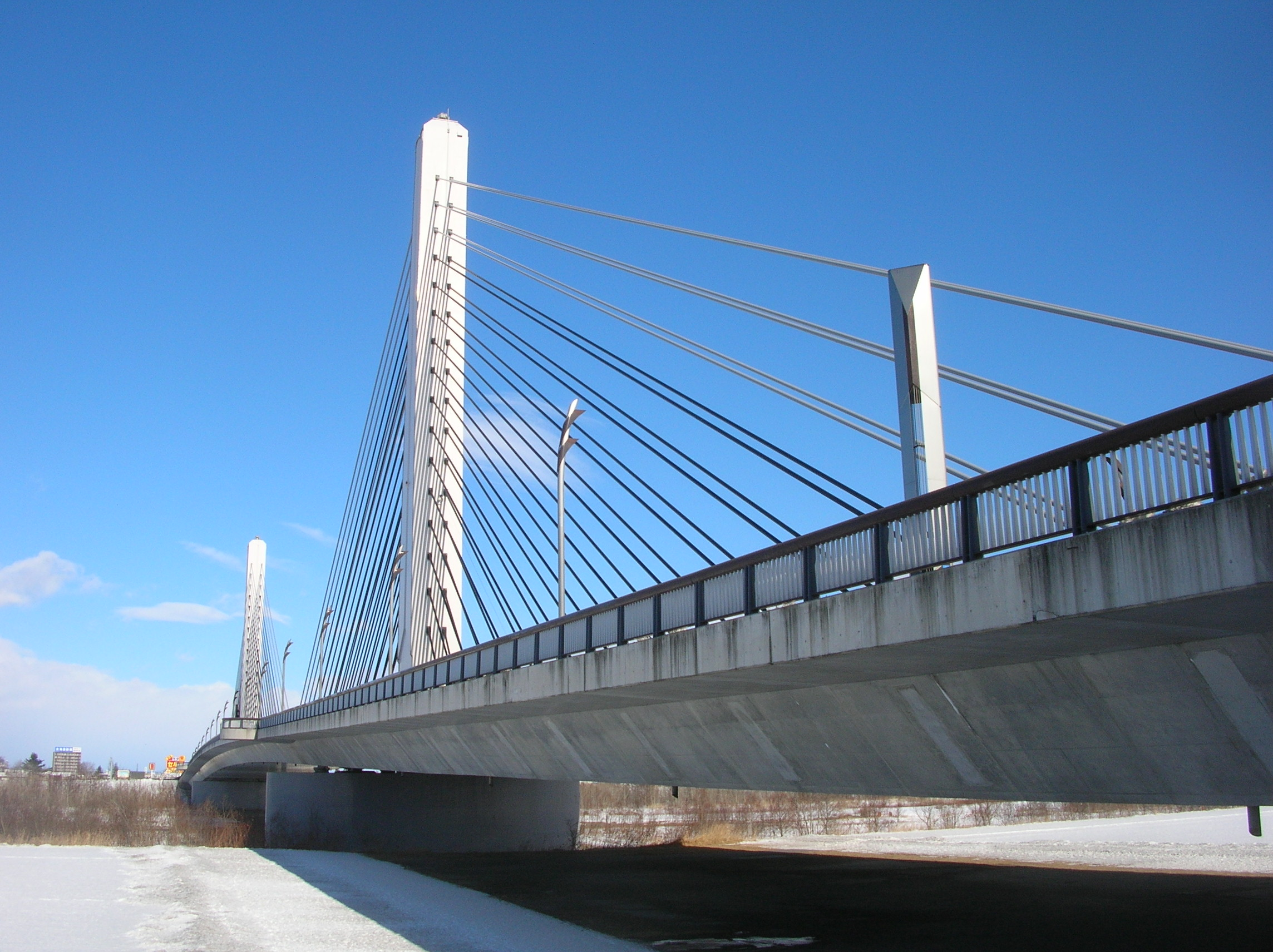 十勝大橋（Tokachiohhashi）